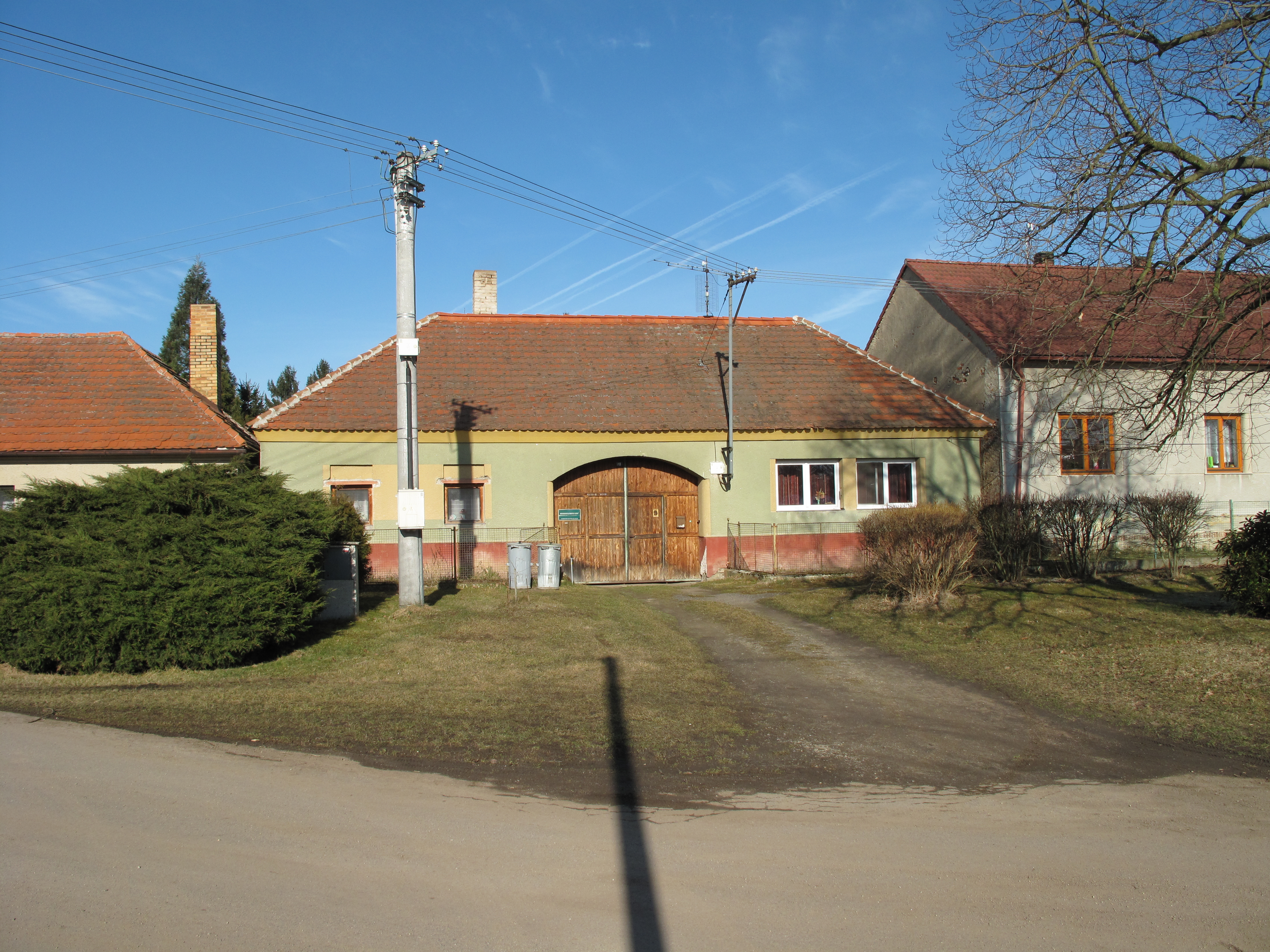 Statek v Újezdci. Okres Strakonice, Česká republika.